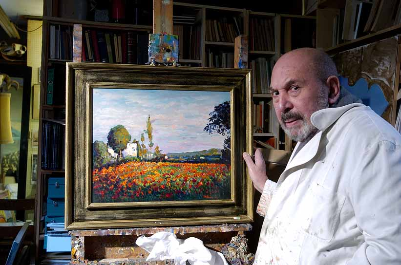 Vincenzo Romano Salvia fotografato dall'amico fotografo Pino Mannarino nel suo studio Roma 2005